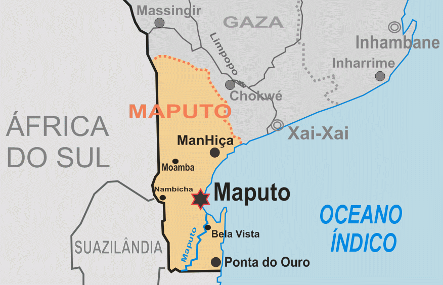 Mapa da Província de Maputo, em Moçambique - feita para a Wikipédia por André Koehne